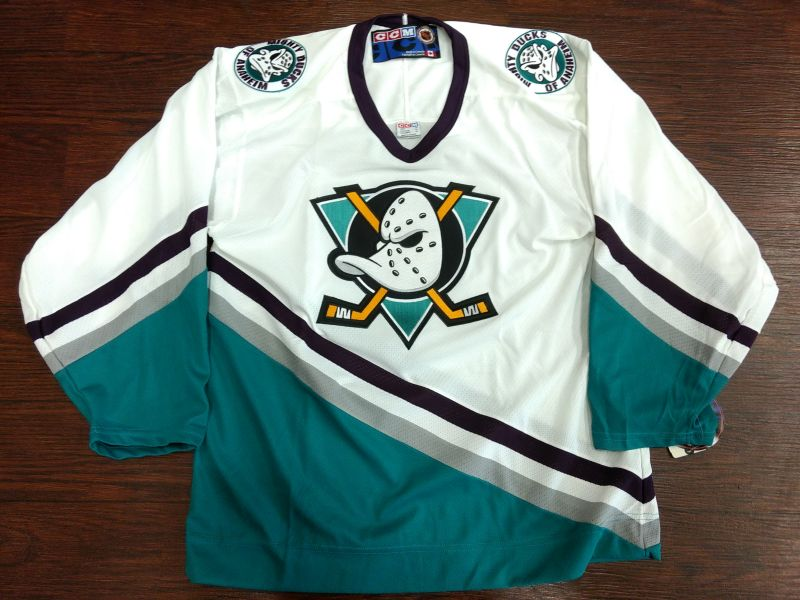 マイティダックスオブアナハイム、ホームゲーム用ジャージ（初代）。